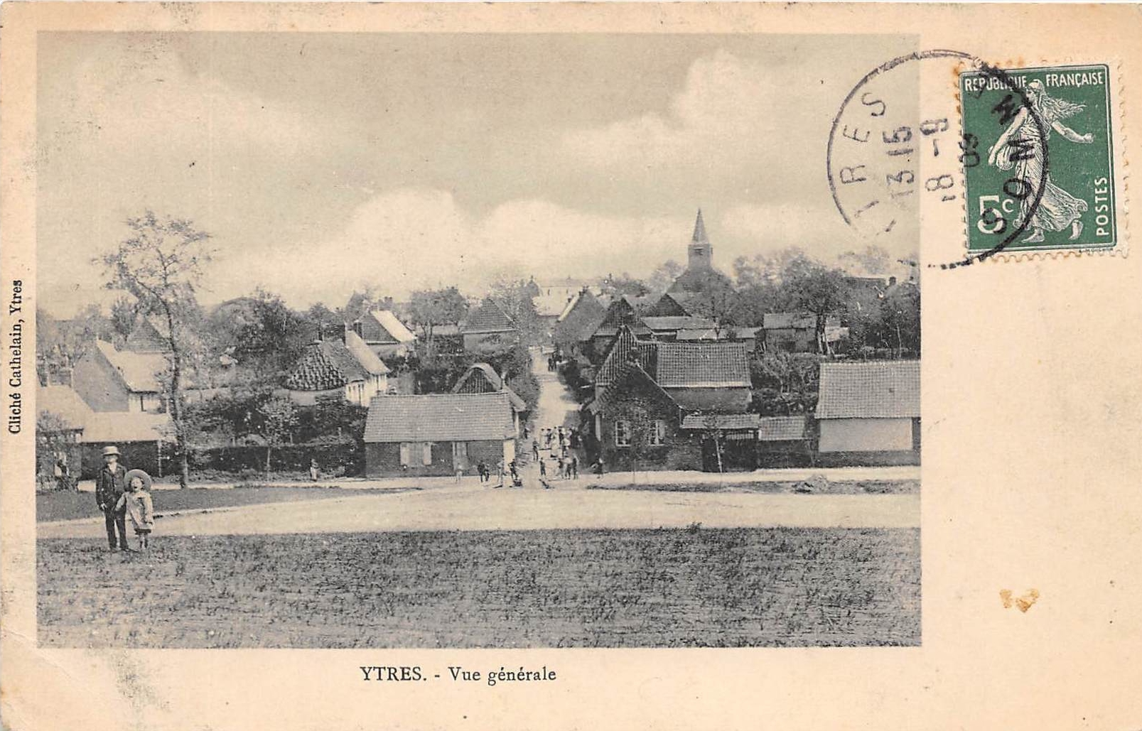 Vue de Ytres depuis la halte du chemin de fer vers 1909.